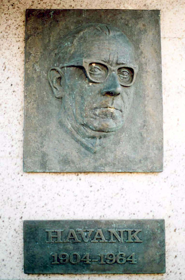 Havank memorial in Leeuwarden by Ben van der Geest, 1996